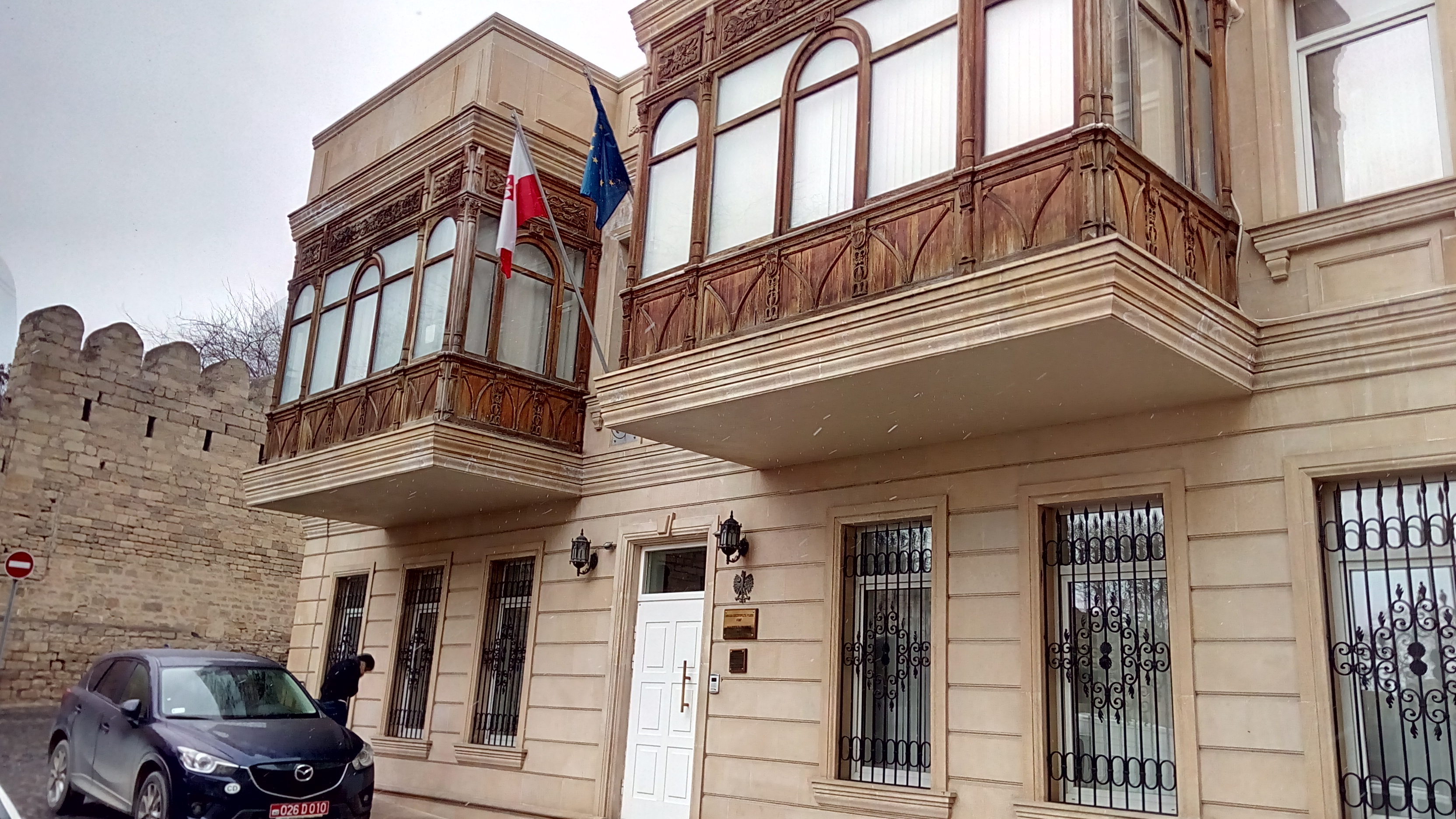 Polşanın Azərbaycandakı səfirliyi